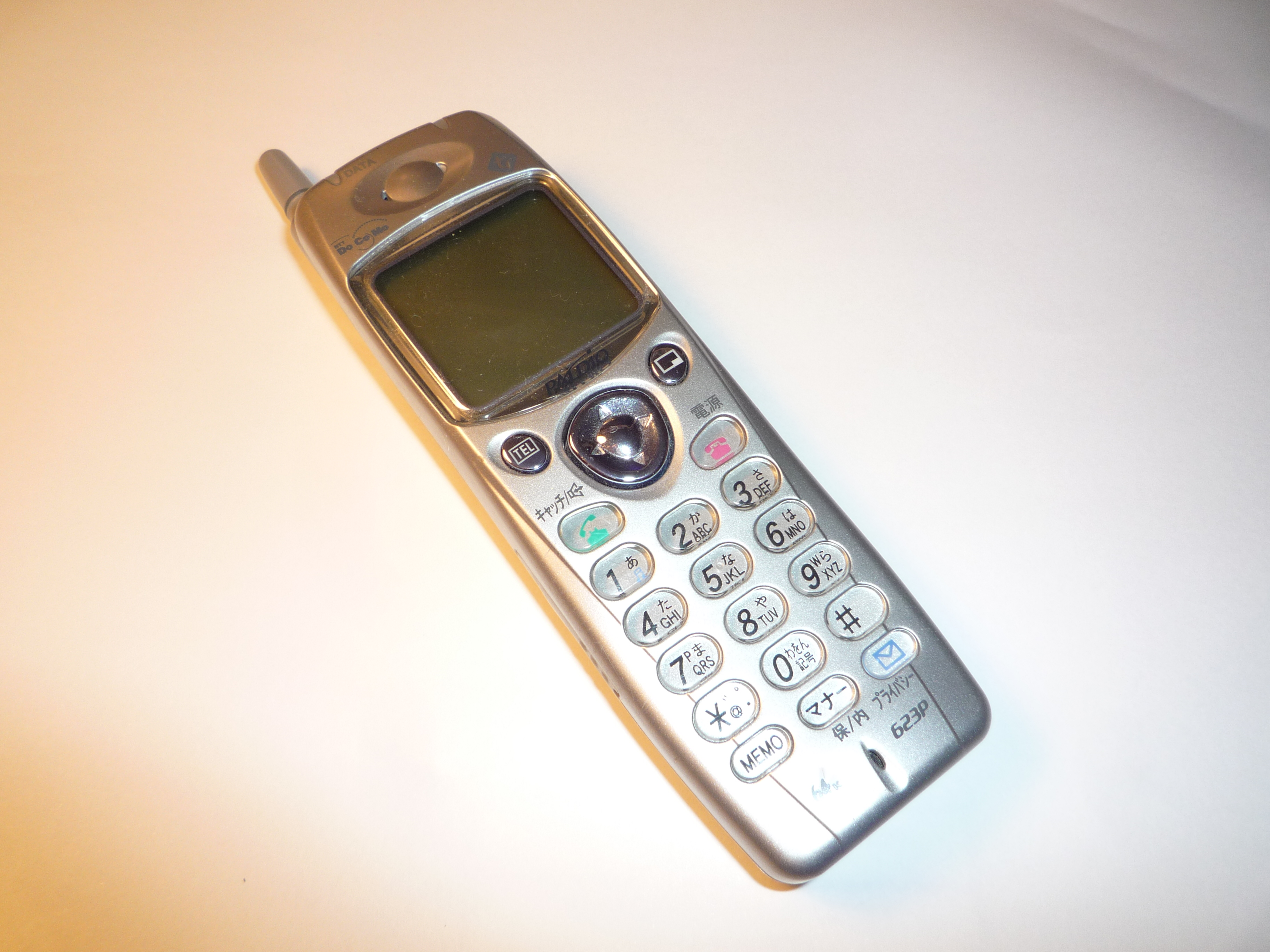 NTT docomo Paldio623P